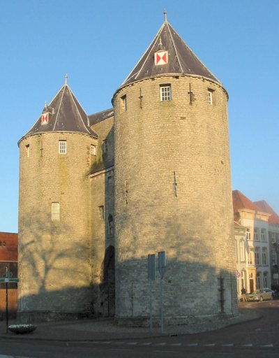 Bergen op Zoom, gevangenpoort, januari 2004, eigen foto